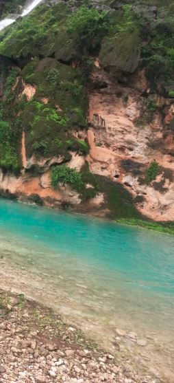 صفاء الماء في عين كور